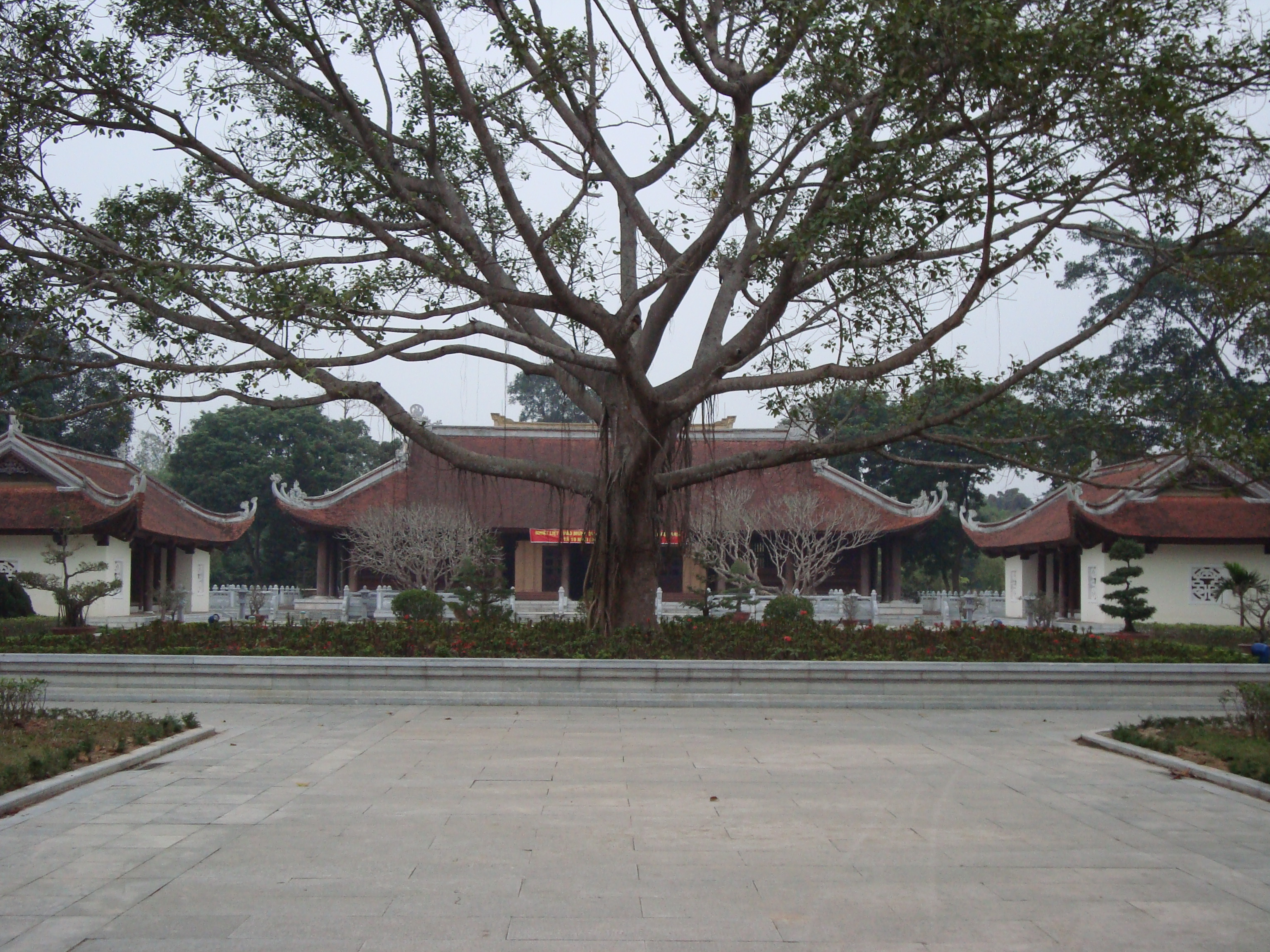 Khu di tích lịch sử Kim Liên